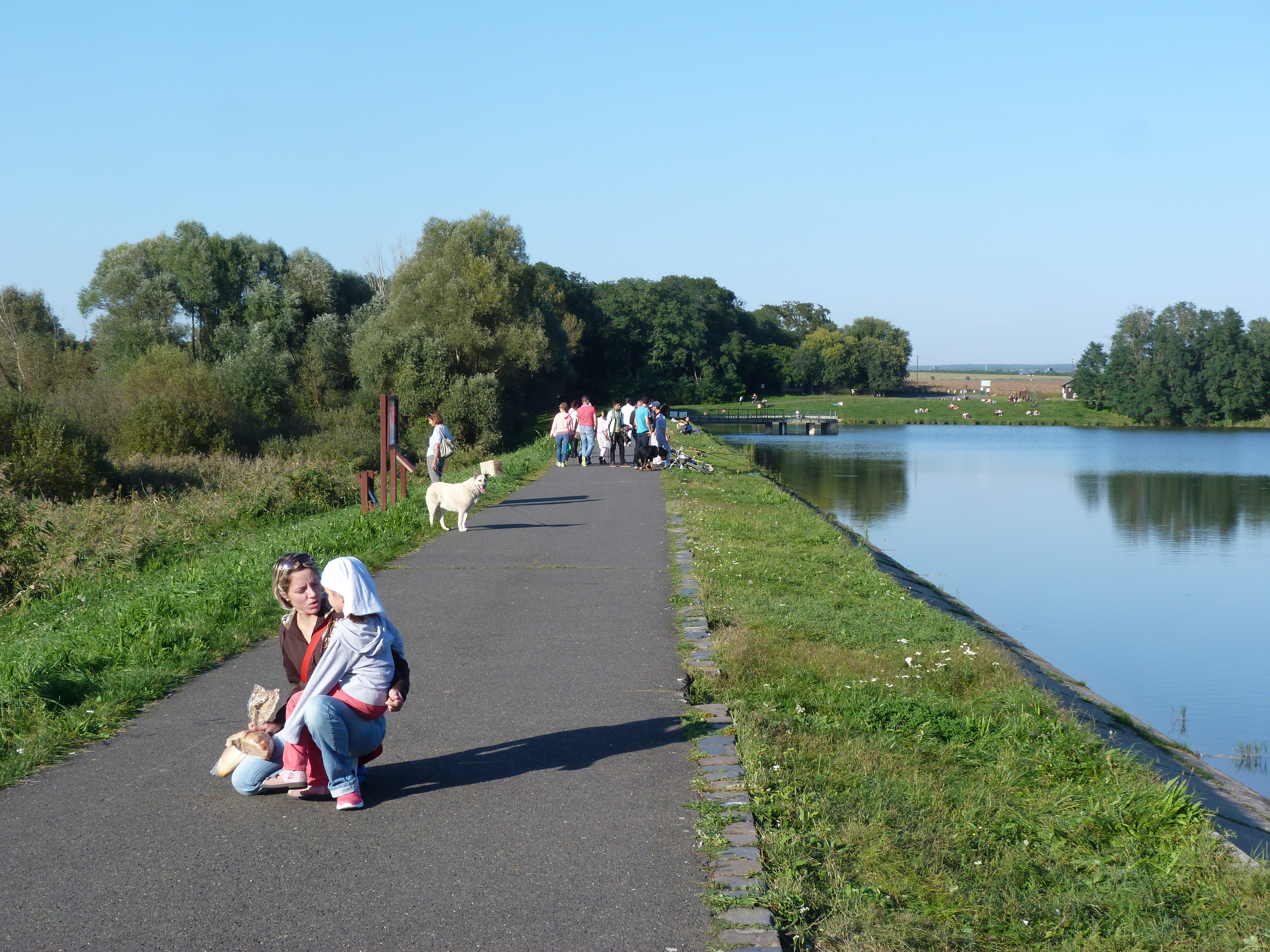 A felvétel 2014. szeptember 28-án, vasárnap készült Budapesten, a Naplás tónál (XVI. kerület). ©© Derzsi Elekes Andor, Budapest 2014, You are authorised to use these photos and vids under Creative Commons – even for commercial, for profit purposes. Photos must be attributed to Derzsi Elekes Andor. All of the photos and vids in the Metapolisz DVD line are under Creative Commons and can be used even for commercial – for profit – purposes. Recommended Citation Derzsi Elekes Andor: Metapolisz DVD line